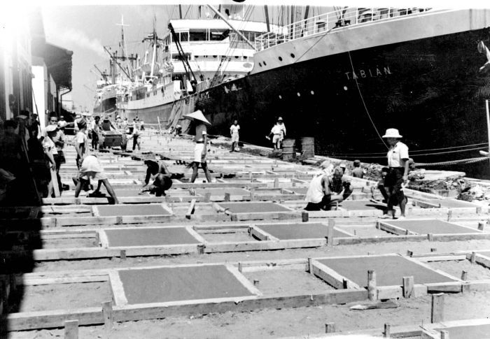 Repronegatief. Wederopbouw van de haven van Makassar, Celebes